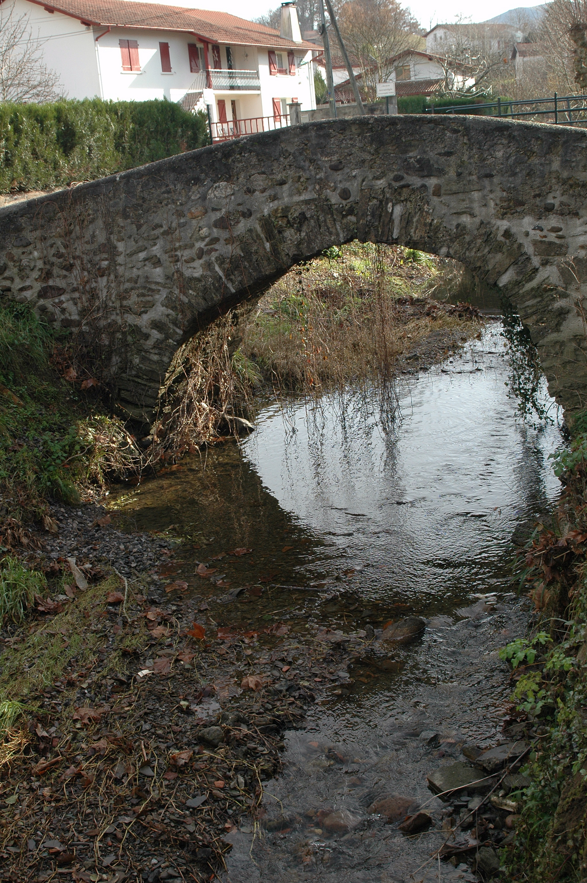 Cambo-les-Bains, pont romain (face est) sur l'Angélu. photo prise le 31/12/06 par Harrieta171